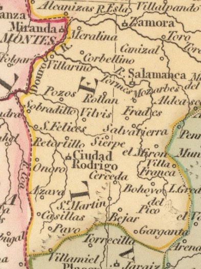 Área de Salamanca y sur de Zamora en el mapa "Spain and Portugal", realizado por Froggett en 1808 y publicado por Robert Wilkinson en Londres